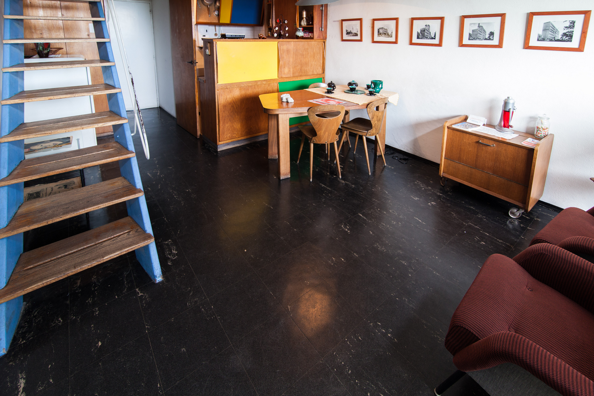 Cité Radieuse .